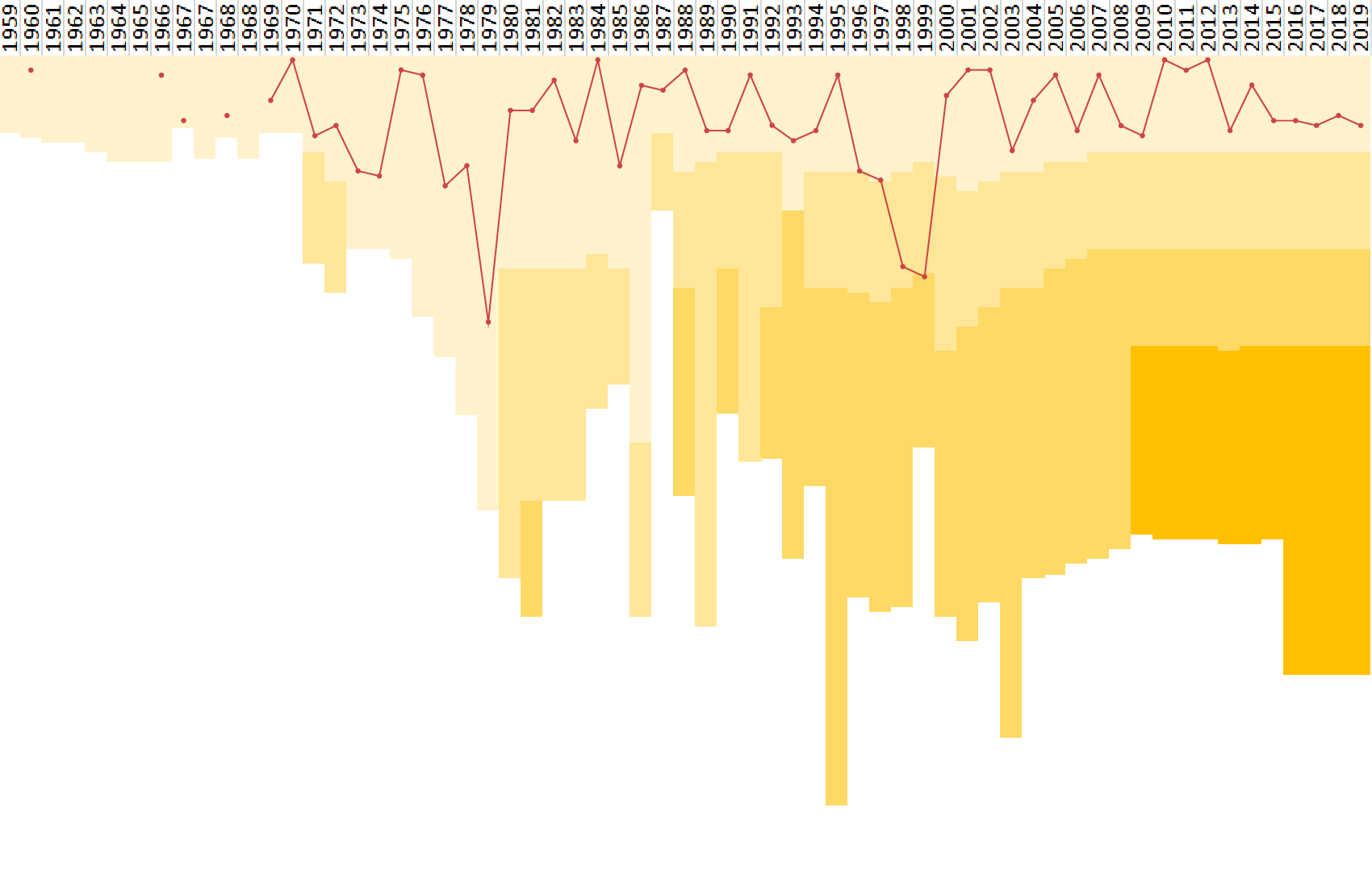 Evolução do Fluminense ao longo dos anos no Campeonato Brasileiro de Futebol conforme sua colocação final. O tom mais claro indica edições da divisão de elite do torneio em cada ano (atual Série A), e assim sucessivamente, com os outros tons indicando as atuais Séries B, C e D.